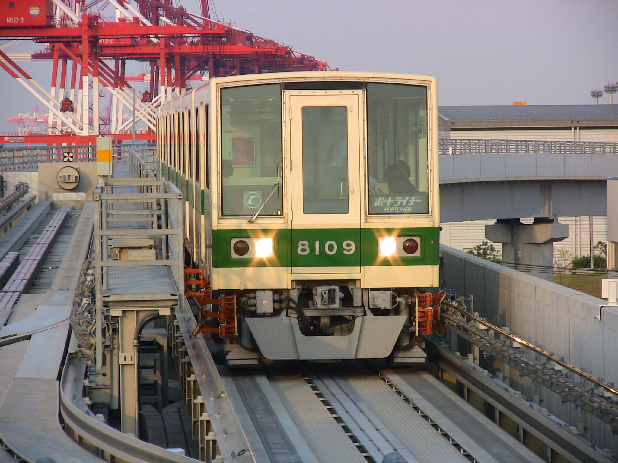 神戸新交通8000型電車 (8109) 2006年9月21日 17:10 ポートアイランド南駅付近（兵庫県神戸市中央区港島南町）‰ 撮影者: špeee